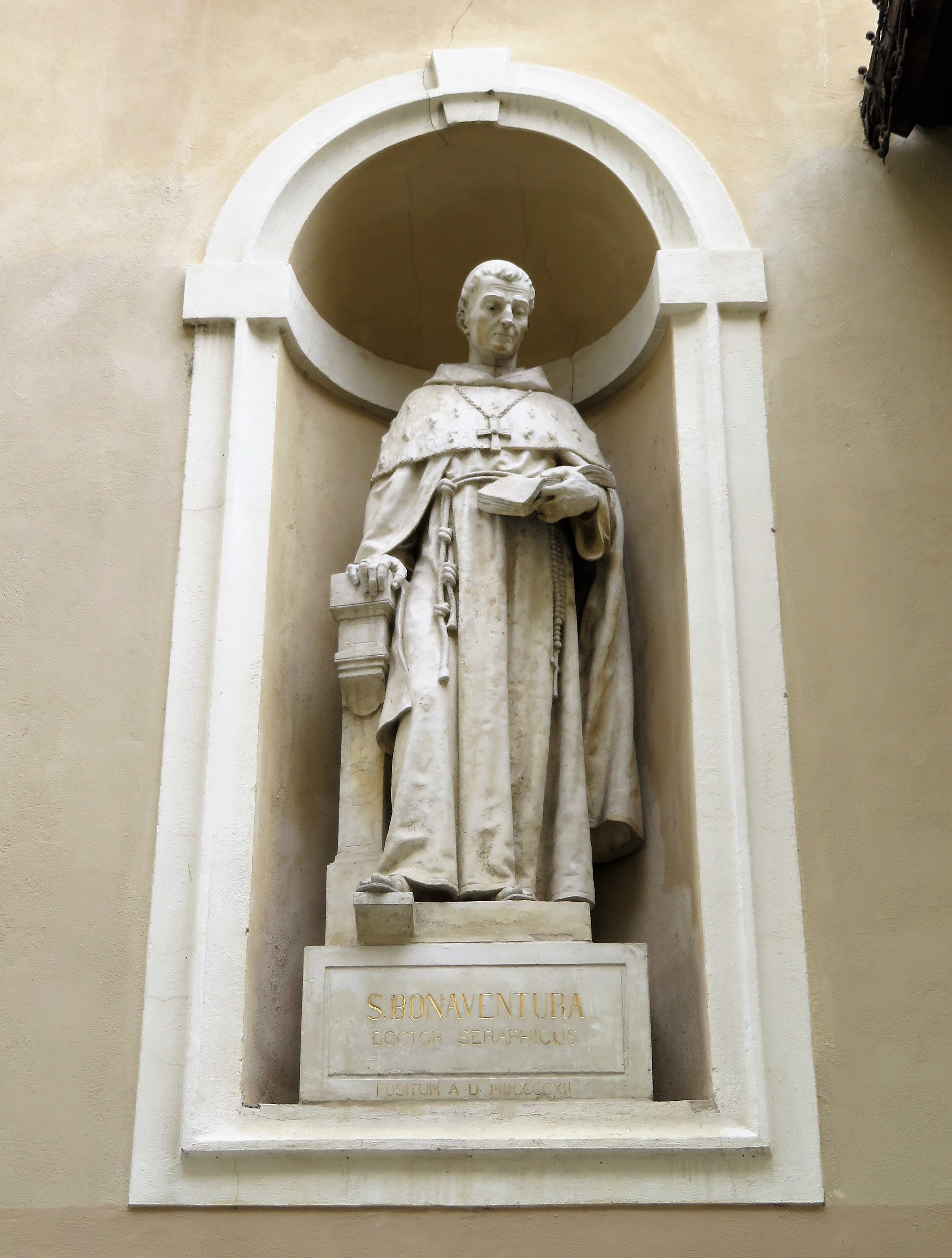 Standbeeld van de Italiaanse franciscaanse theoloog en filosoof Bonaventura op de St. Nicolaaskathedraal in Ljubljana, Slovenië.